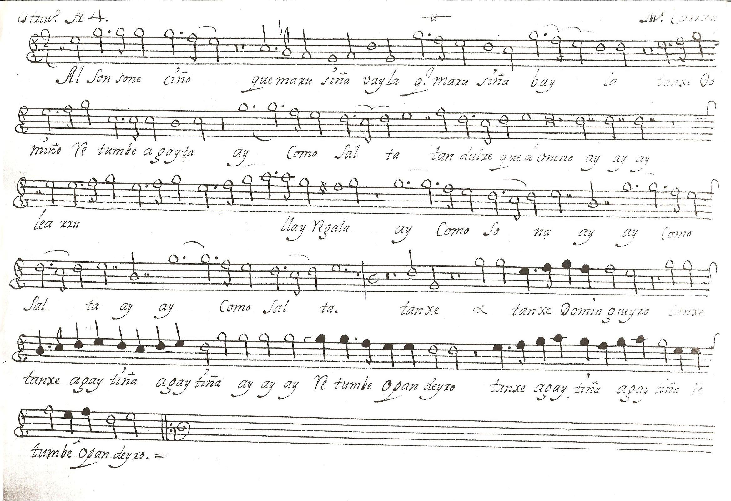 Partitura de Jerónimo de Carrión, Parte de tiple del villancico "Al son soneciño"